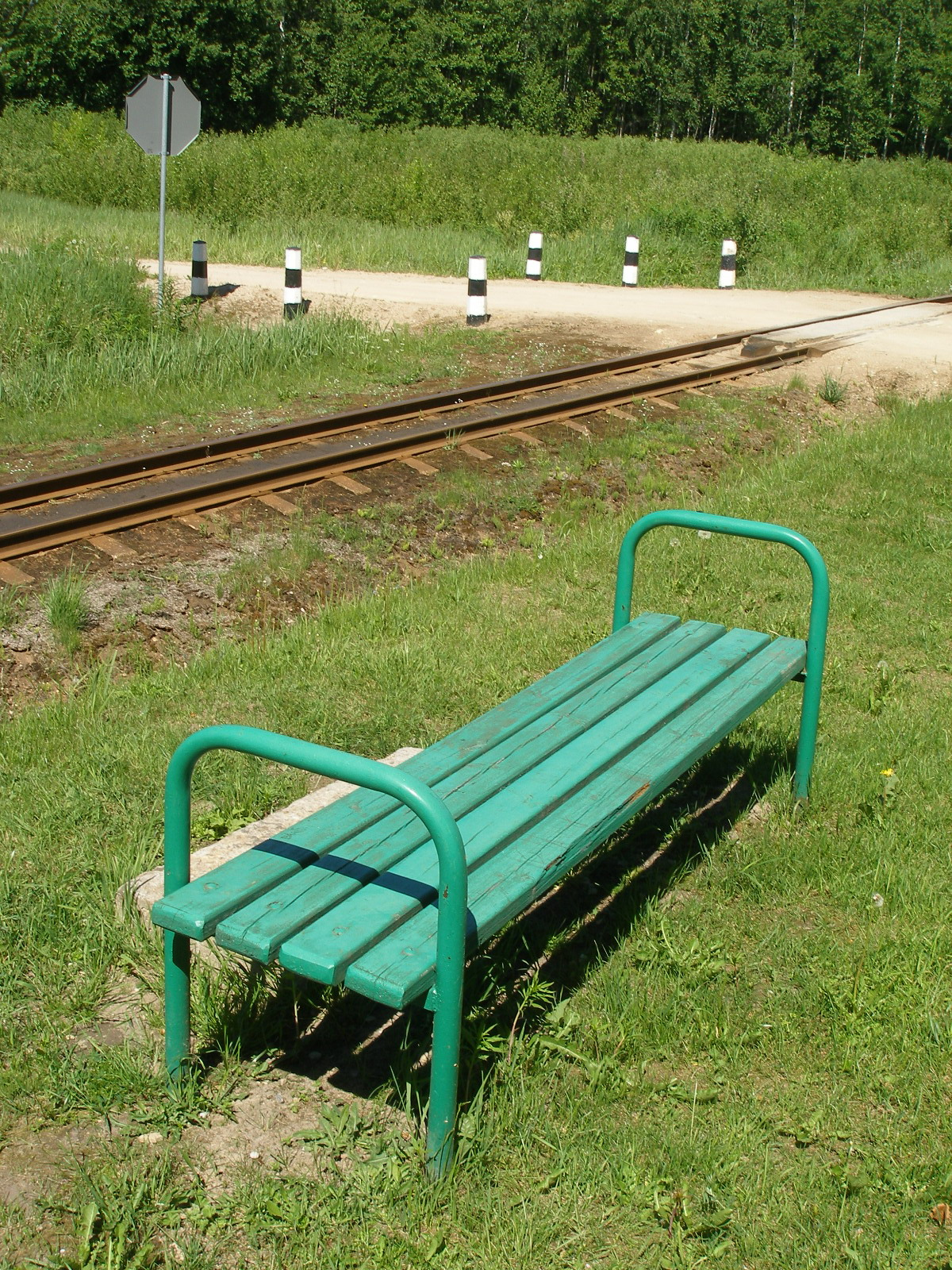 Birzes pieturas punkta soliņš.